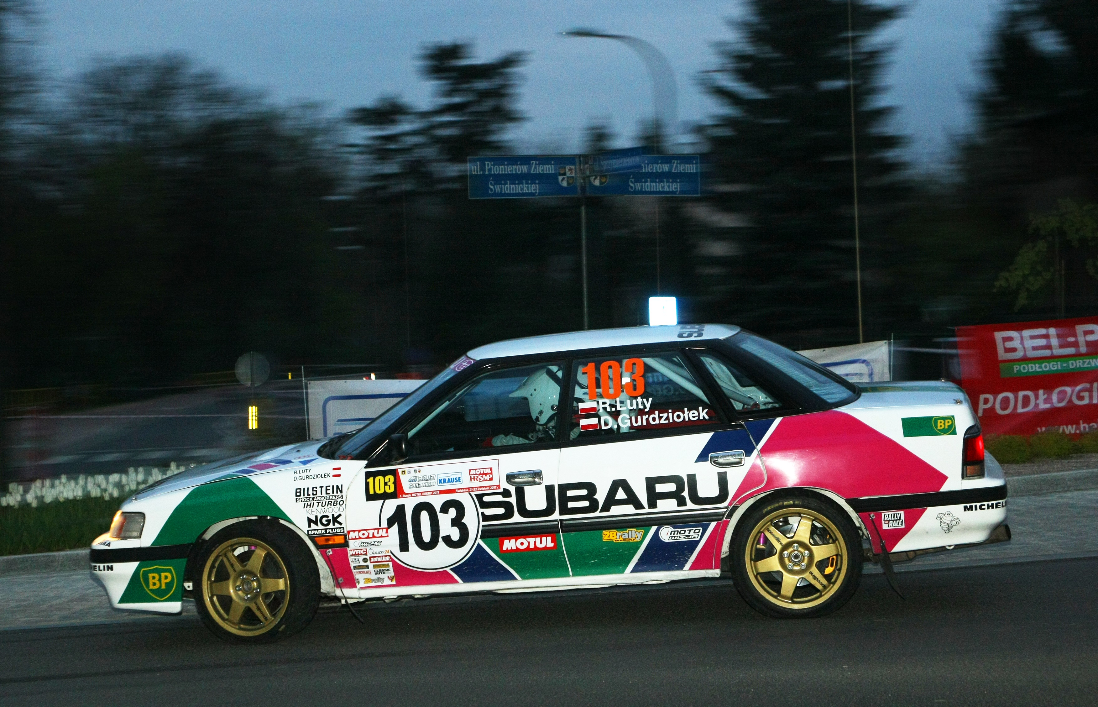 Subaru Legacy